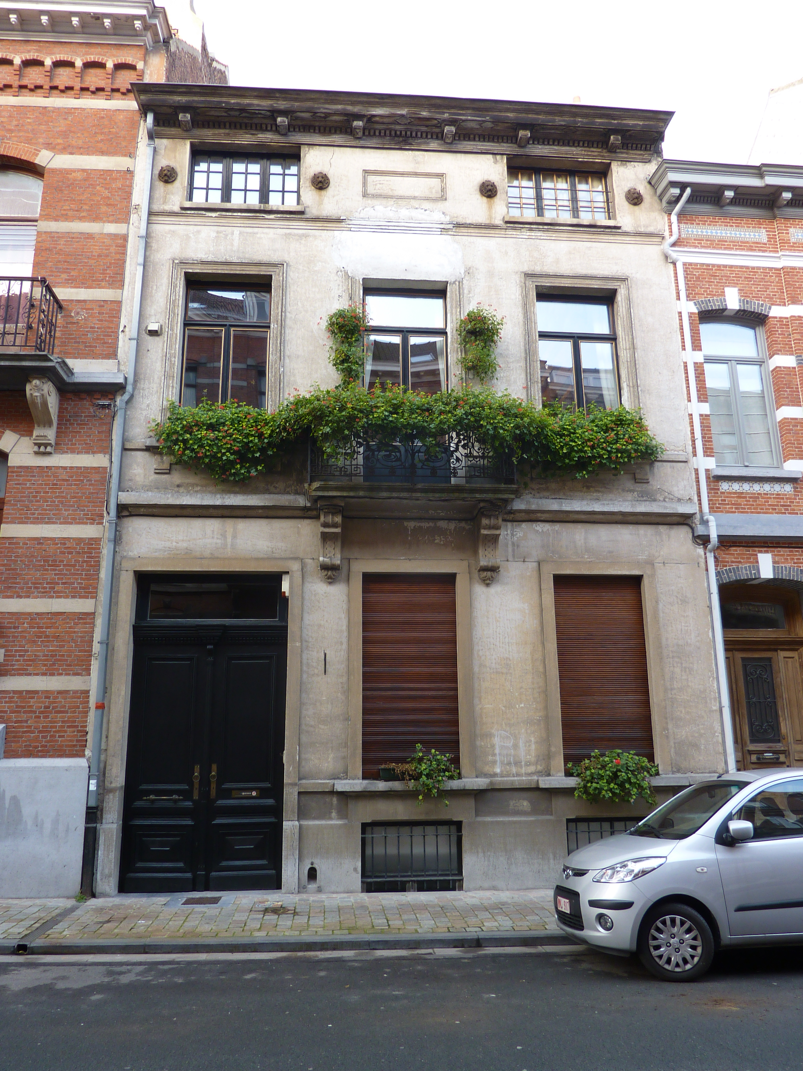 Rue Albert de Latour numéro 30 à Schaerbeek, Bruxelles, Belgique.